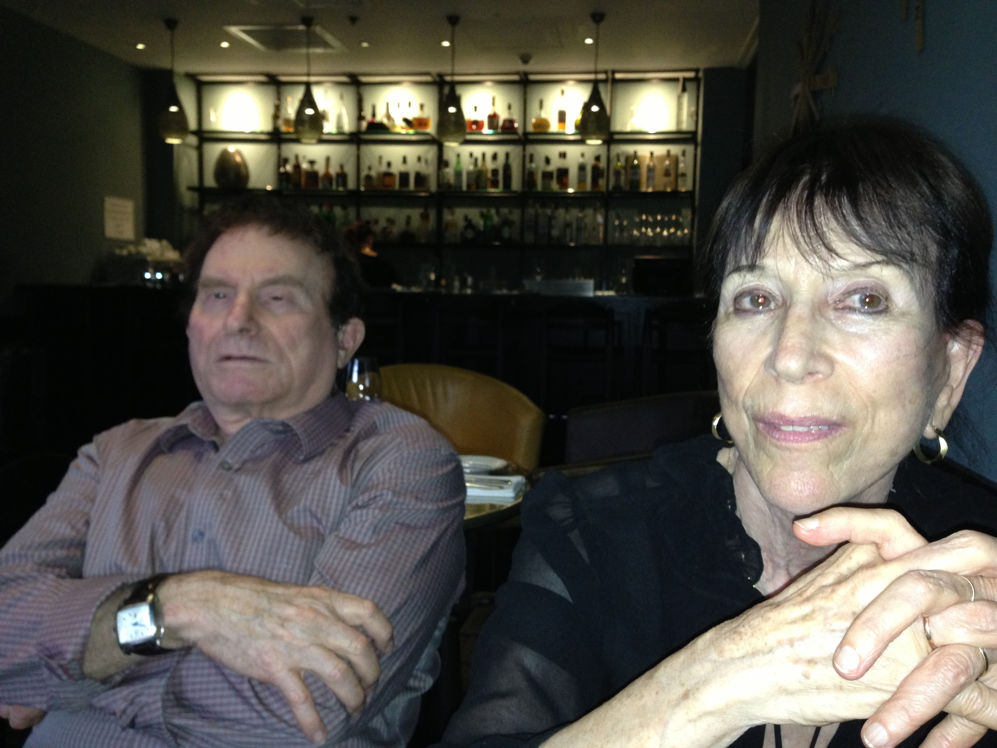 ברטה והילל, מייסדי הבלט הישראלי